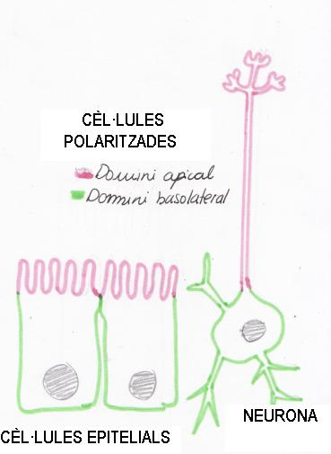 Les cèl·lules epitelials i nervioses són els millors exemples de cèl·lules polaritzades. En rosa es mostra el domini apical i en verd el domini basolateral.